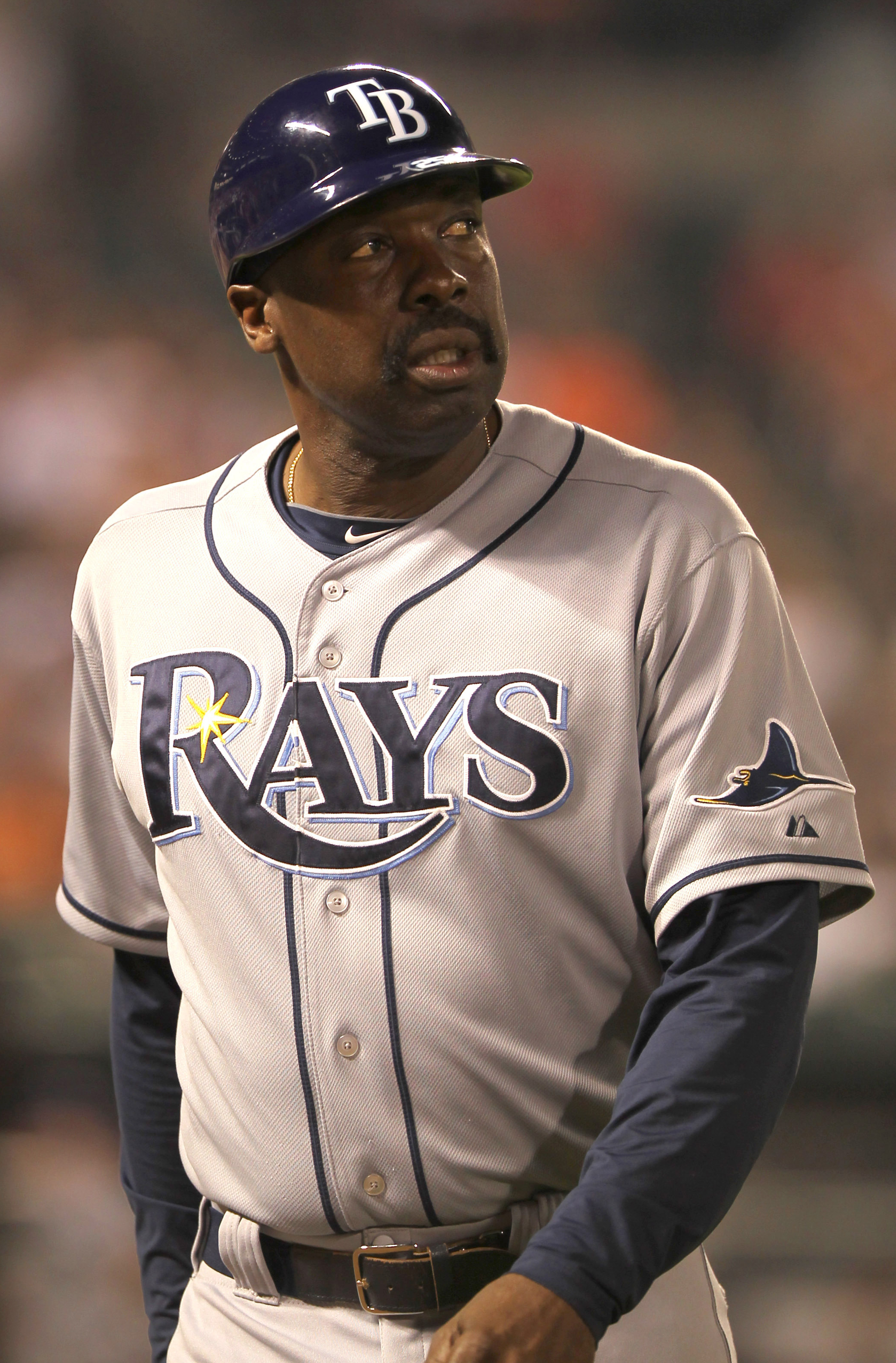 George Hendrick